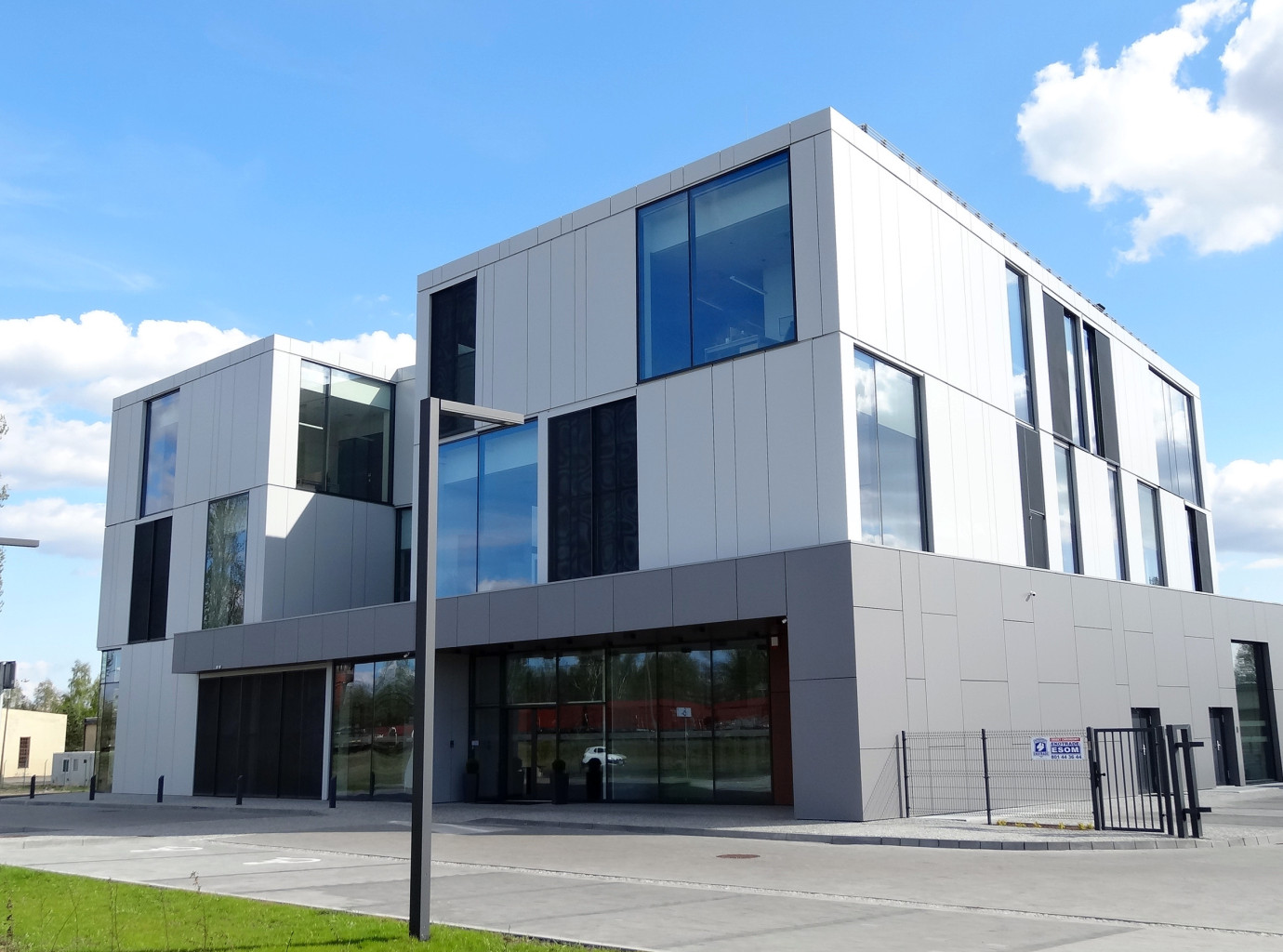 Urząd Dozoru Technicznego w Bydgoszczy, ul. Kamienna 76